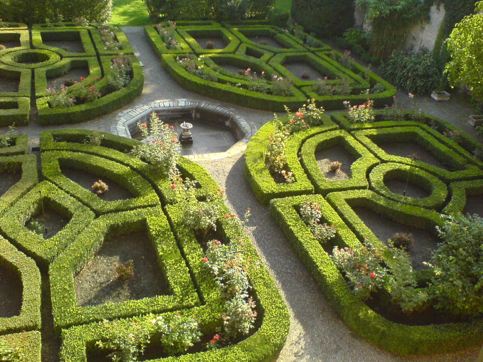 the hidden italian style garden - PALAZZO SALIS (XVI-XVII century)in Tirano (SO)